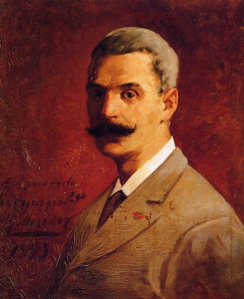 Autorretrato, óleo sobre lienzo, 56 x 46 cm, colección particular, Güimar, Tenerife